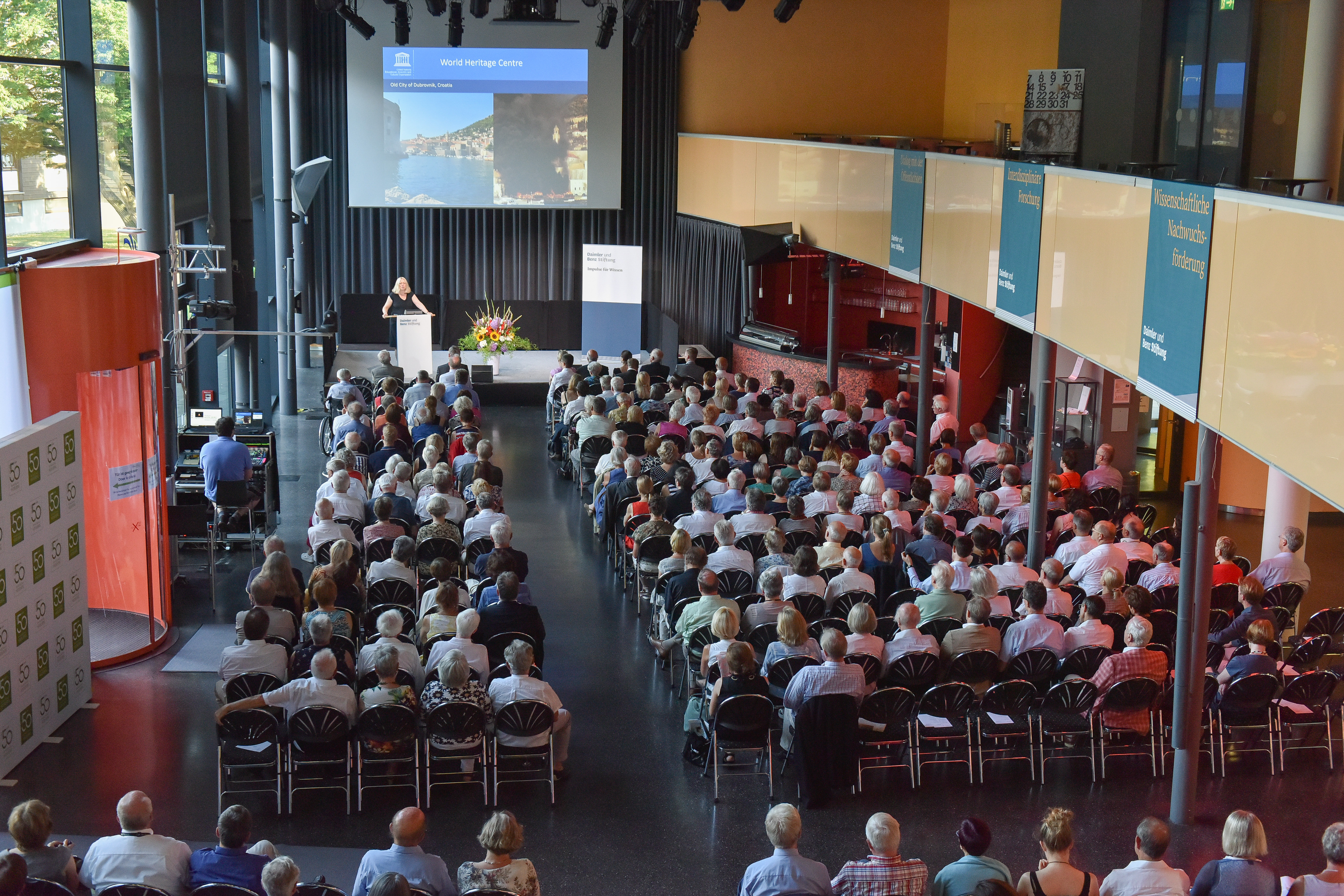 Bertha-Benz-Vorlesung, SRH-Campus